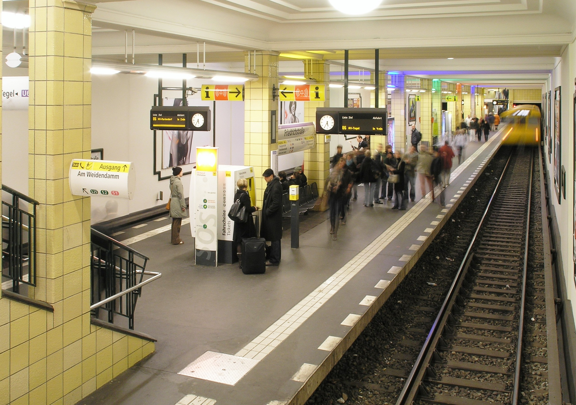 U-Bahnhof Berlin Friedrichstraße auf der Linie U6 – rechts ein ausfahrender Zug in Richtung Oranienburger Tor/Alt-Tegel, auf der gegenüberliegenden Seite das Gleis in Richtung Französische Straße/Alt-Mariendorf – links der Aufgang zum südlichen Zwischengeschoss und zum gleichnamigen S-Bahnhof (Stadtbahn), am anderen Ende des Bahnsteigs der nördliche Aufgang zur Friedrichstraße